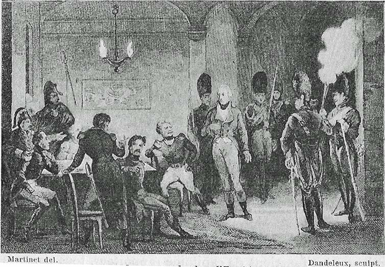 Le jugement du duc . Gravure du XIXe siècle.